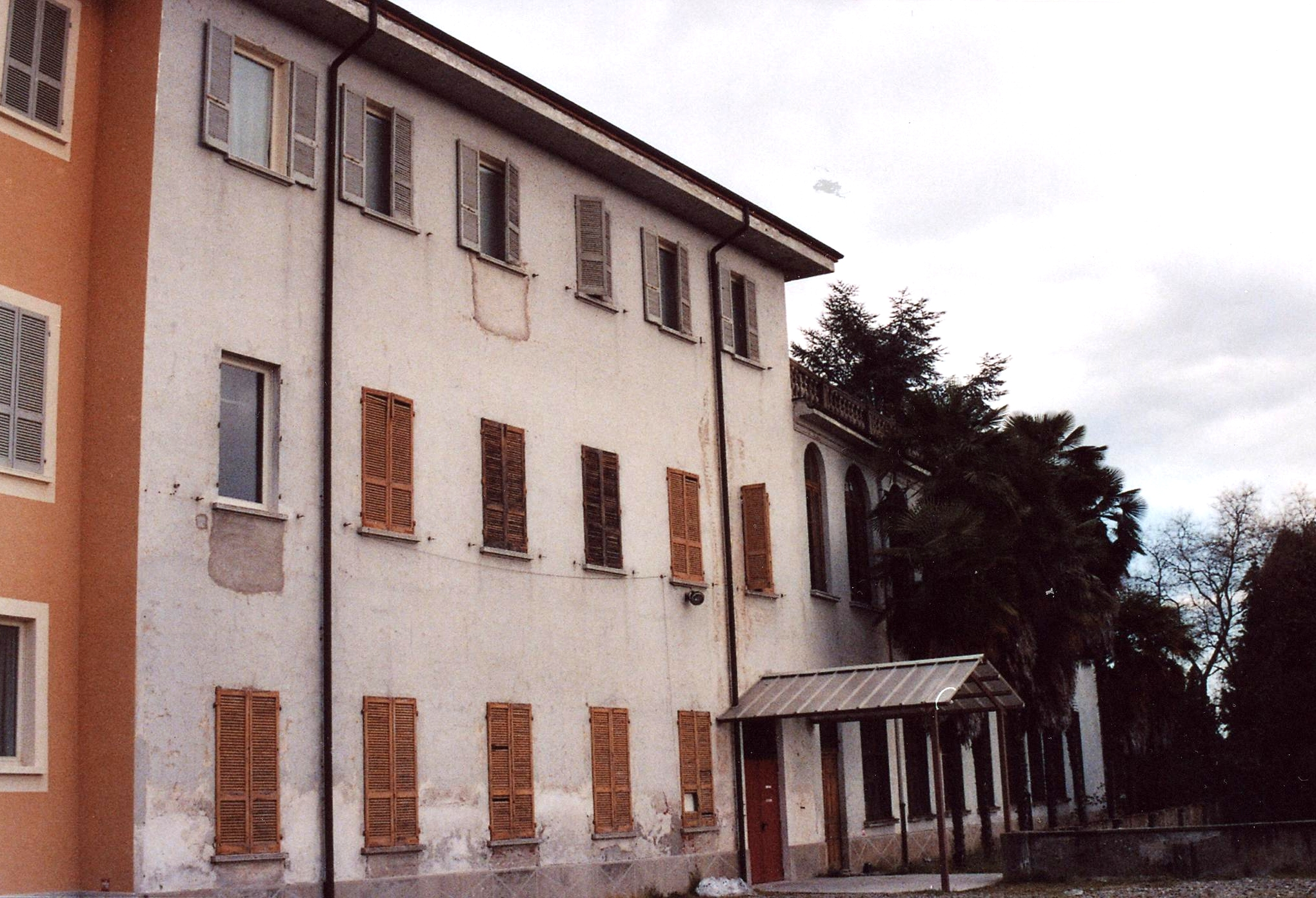 Fara Novarese (NO), Castrum Novum o Castello Superiore, l'esterno attuale.